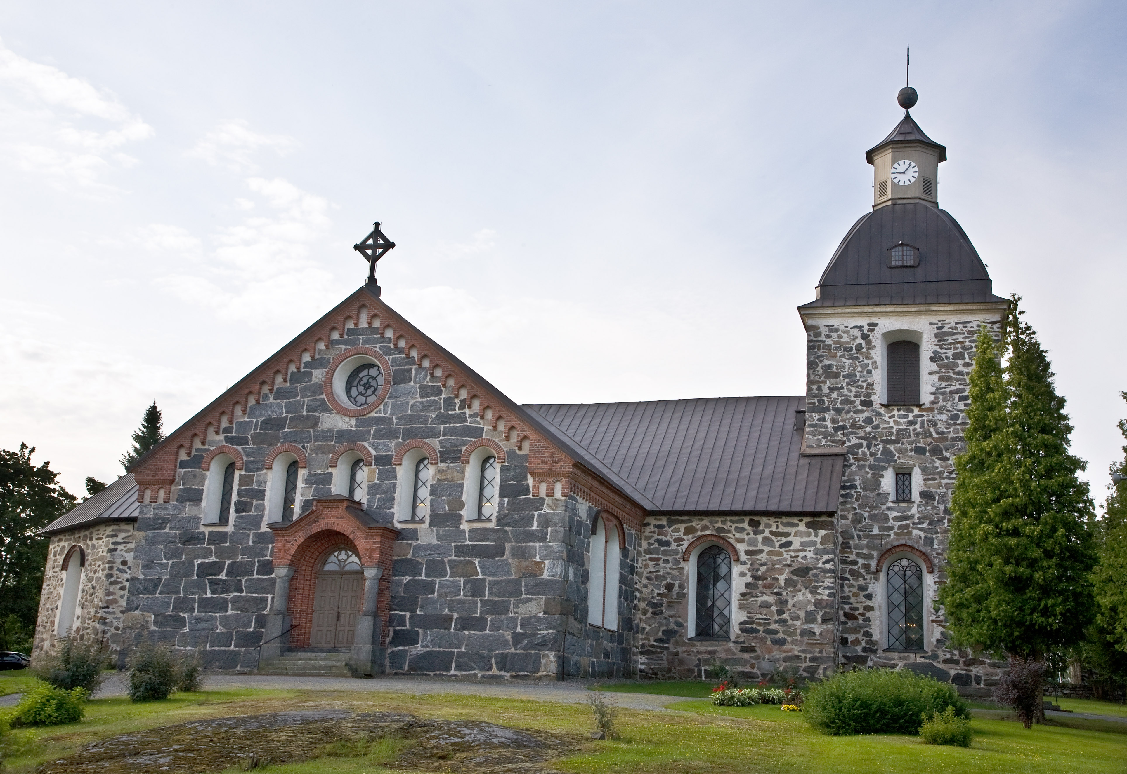 Yleiskuva Kokemäen kirkosta Tulkkilantieltä.